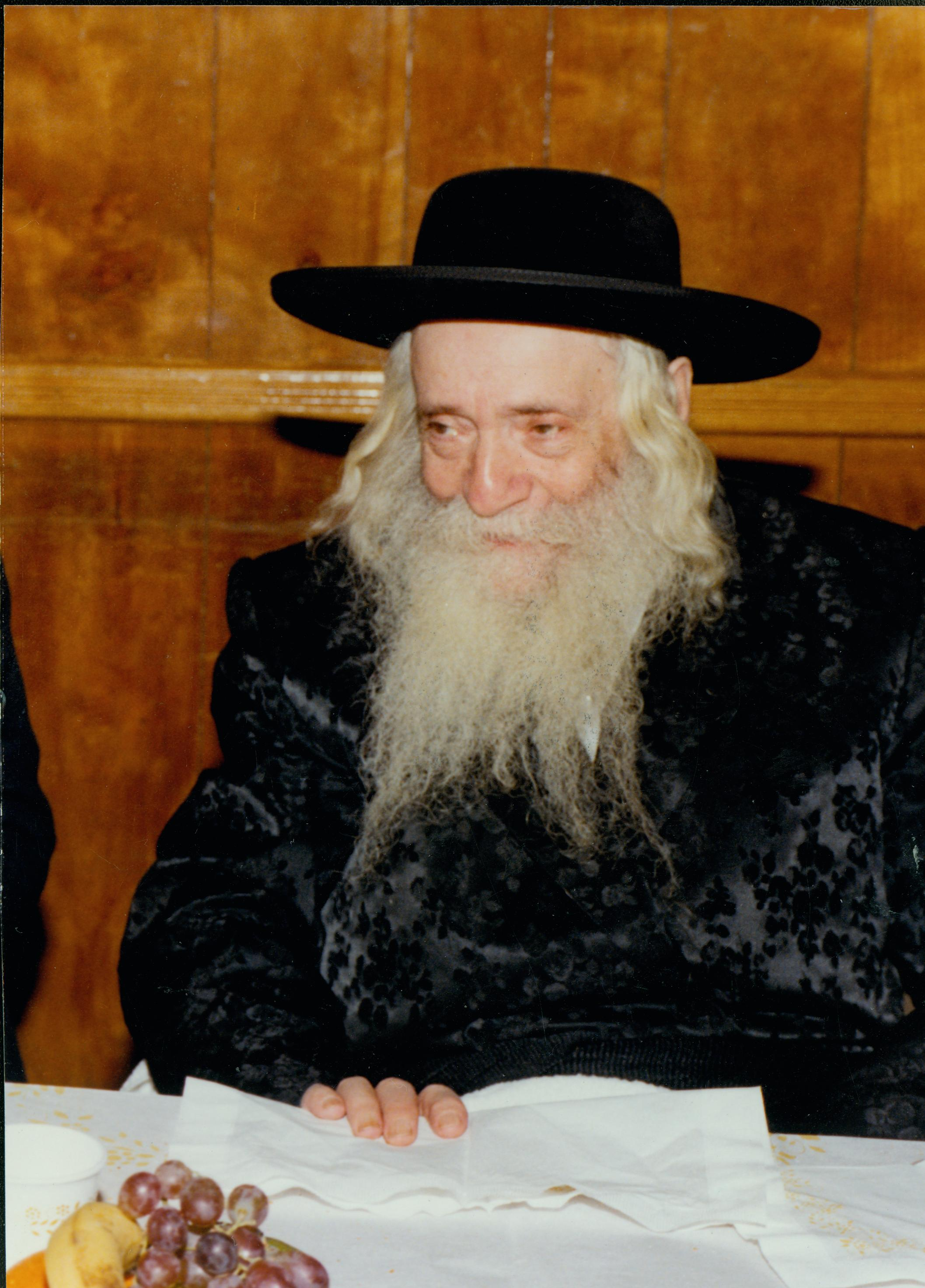 הרבי השפע חיים מצאנז זיע